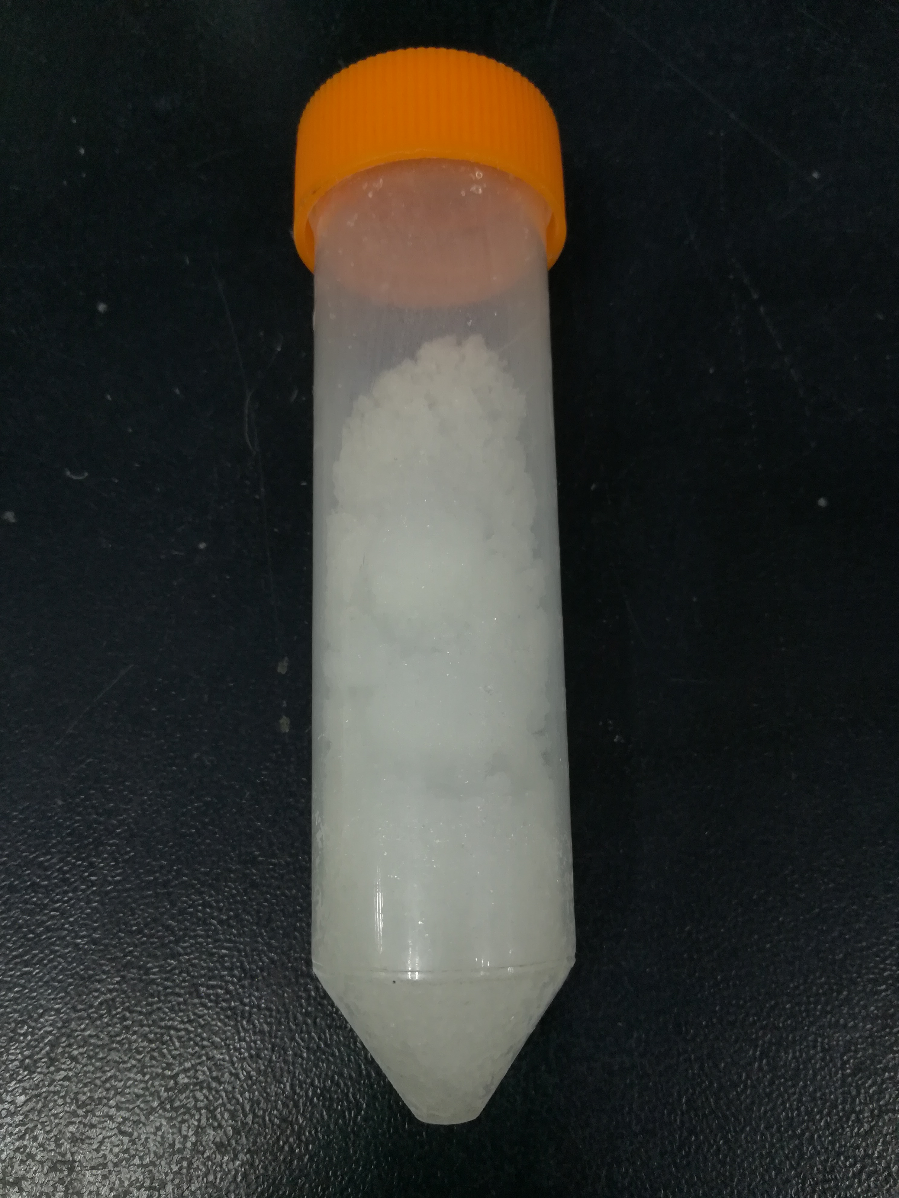 硝酸镥（水合）